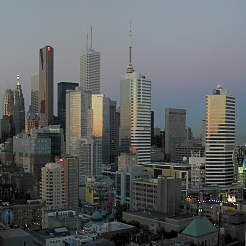 Skyline Torontos während der Dämmerung